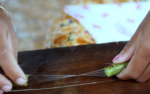 Lotus silk yarn - Fasern im Stängel des Lotus für Lotusseide